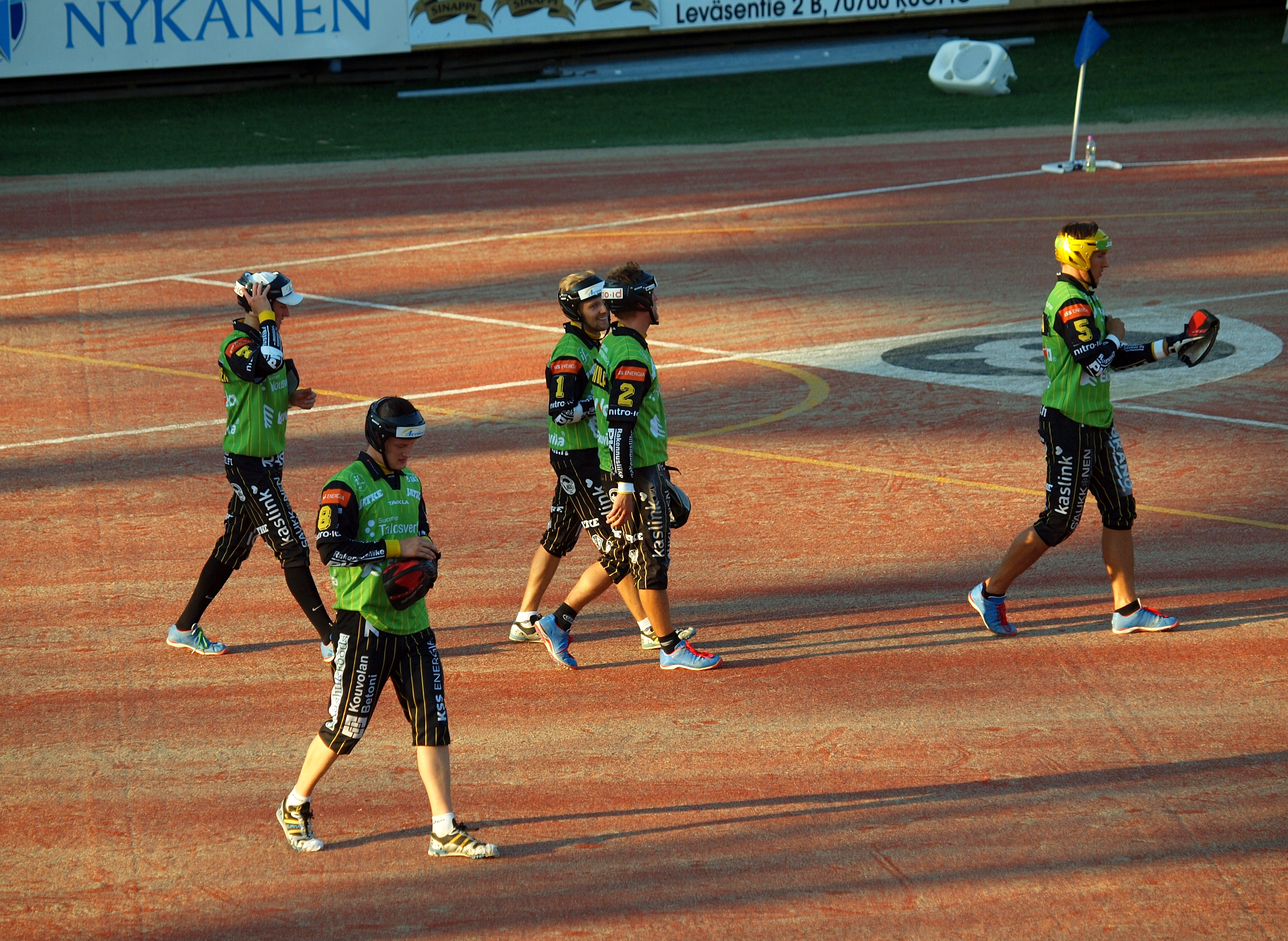 Vimpelin Veto - Kouvolan Pallonlyöjät pesäpallo-ottelu 5.8.2014.